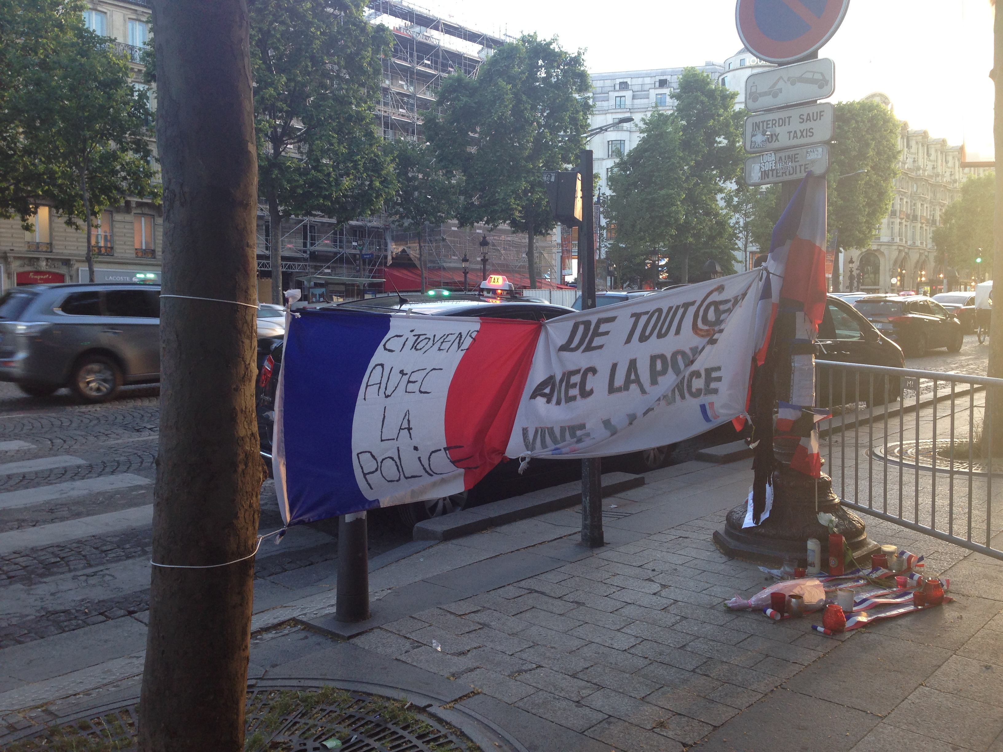 Hommage de attentat du 20 avril 2017 sur l'avenue des Champs-Élysées Photo prise le 5 juin 2017.